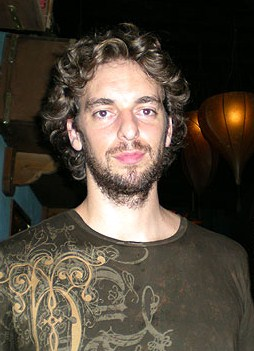 Pau concentrado con la Selección de basket en el Puerto de Santa María.